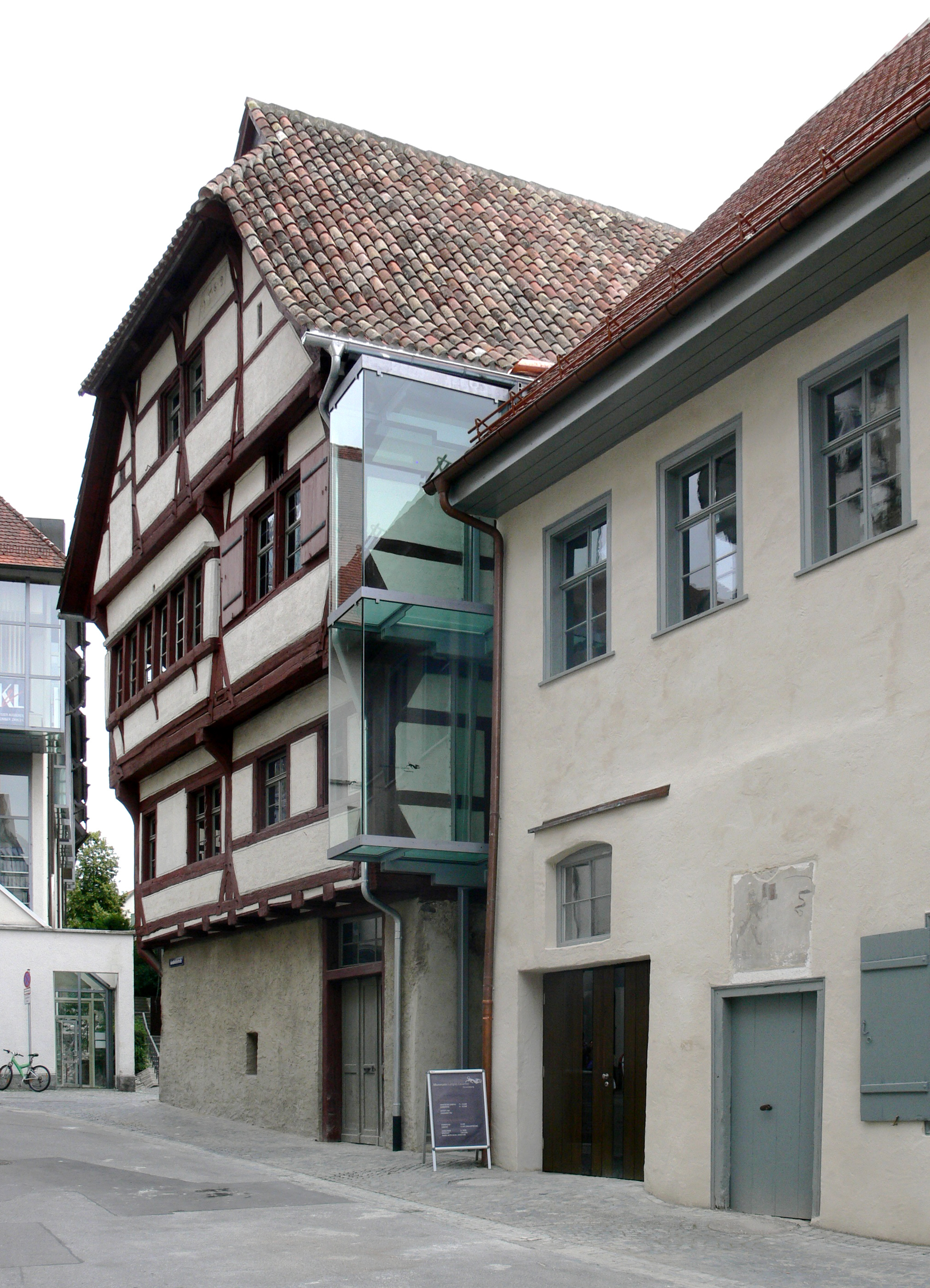 Museum Humpisquartier, Ravensburg Fassade Roßbachstraße mit Hintereingang (Mitte) und Neidegg'schem Haus (links)